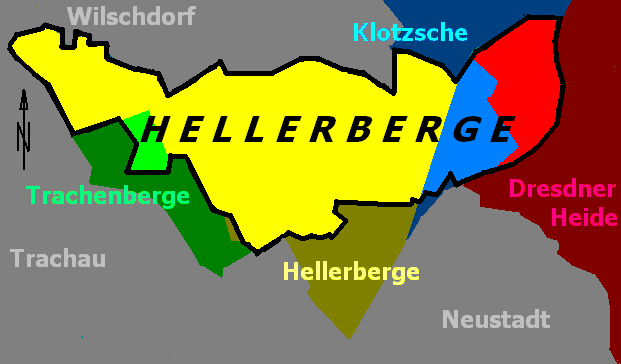 Dresden-Hellerberge, based on Image:Dresden Stadtteil Hellerberge.PNG and Image:Gemarkung Dresden-Hellerberge.PNG